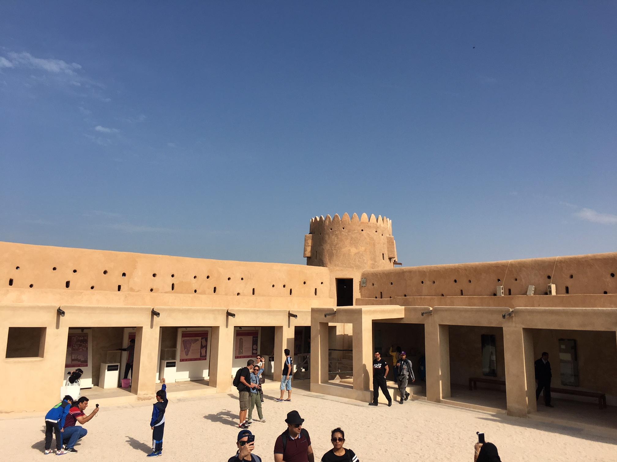 صورة لقلعة الزبارة من الداخل من تصوير عبير جابر